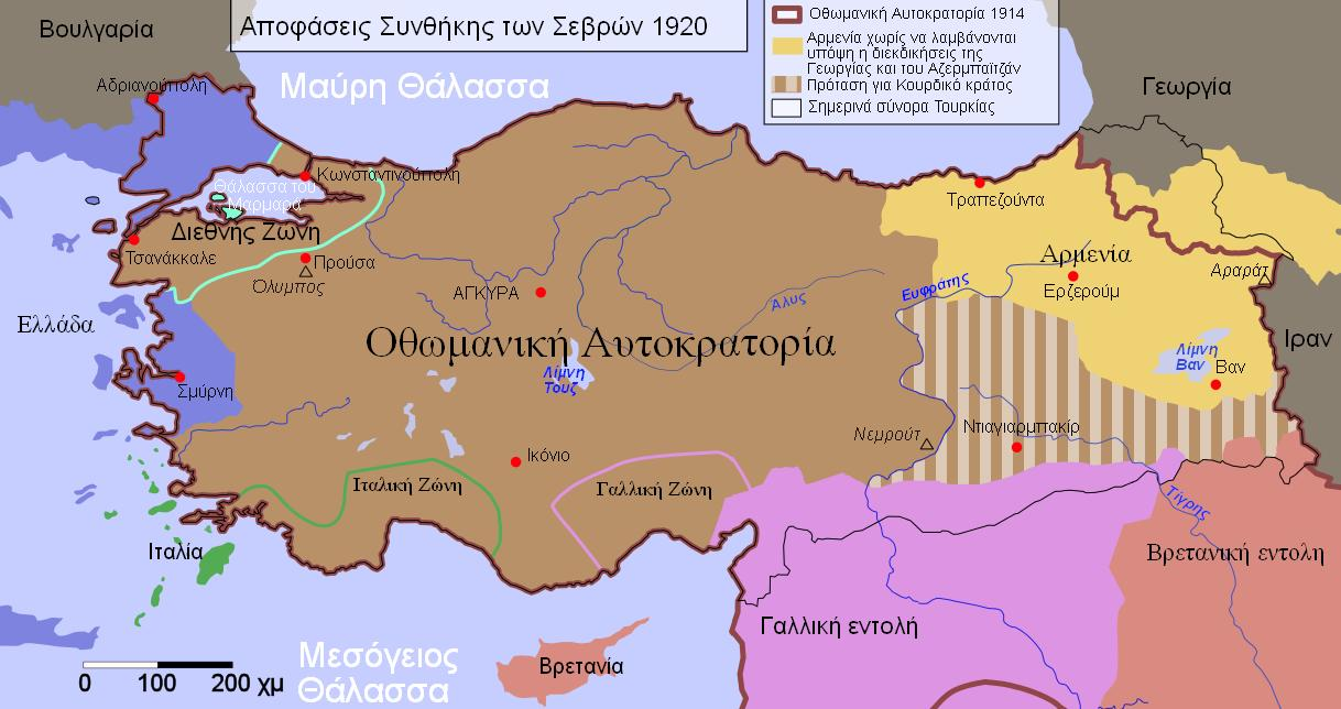 Ο διαμοιρασμός της Οθωμανικής αυτοκρατορίας το 1920